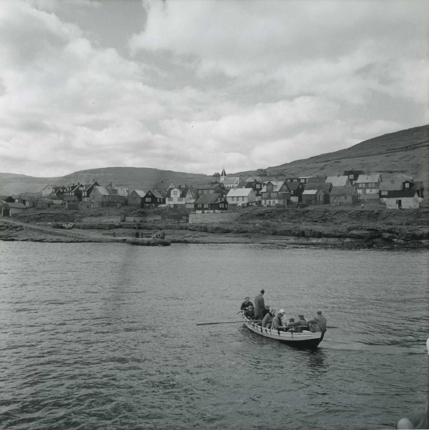 Bygden på Svinoy. En båd på vej til landingspladsen.